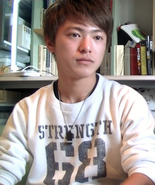 渡邉聖斗のYouTube動画に出演した丸山瀬南